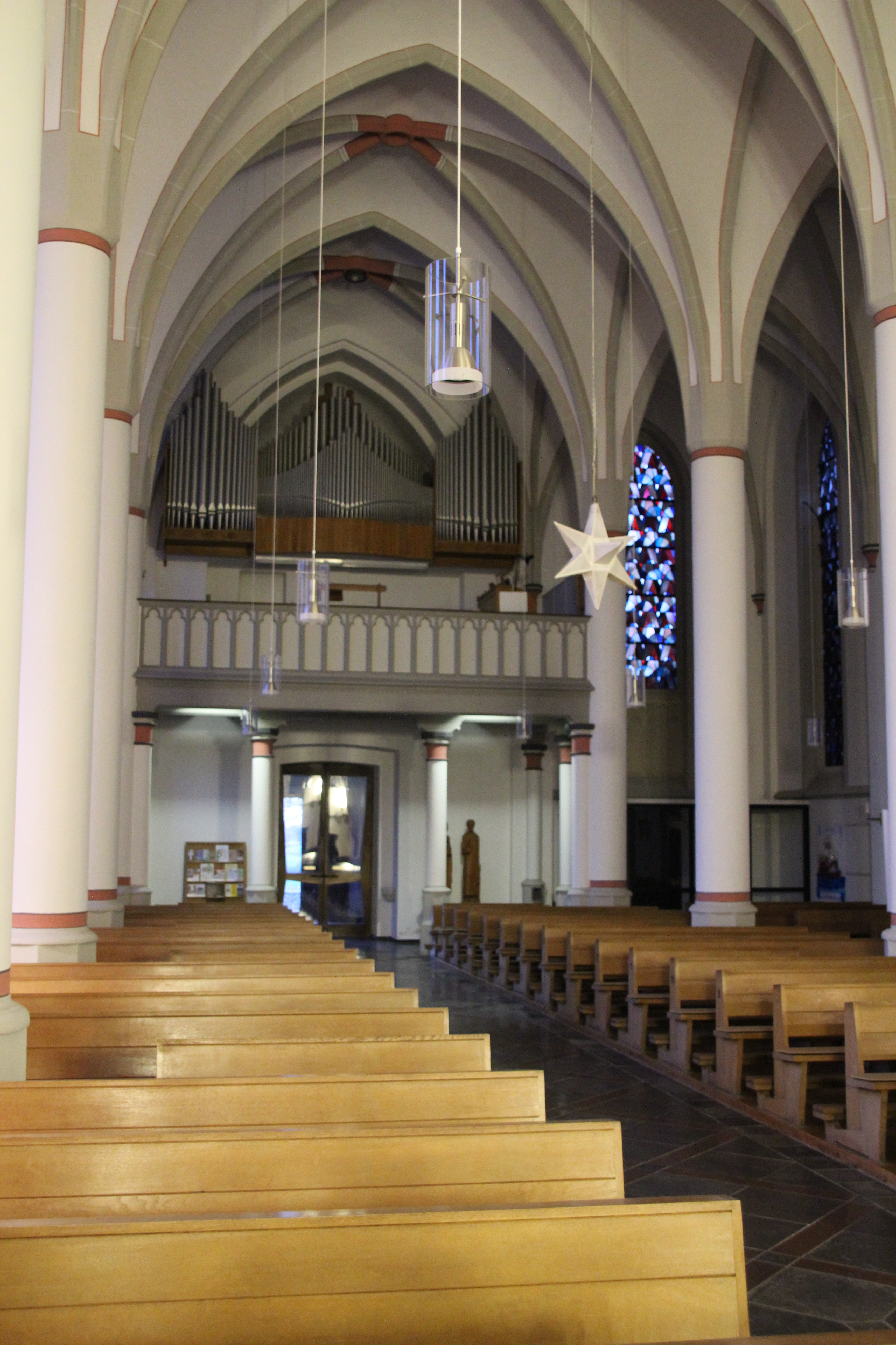 Innenraum der Pfarrkirche St. Johannes Evangelist in Gürzenich mit Blick zur Orgel der Orgelbaufirma Karl Kamp.